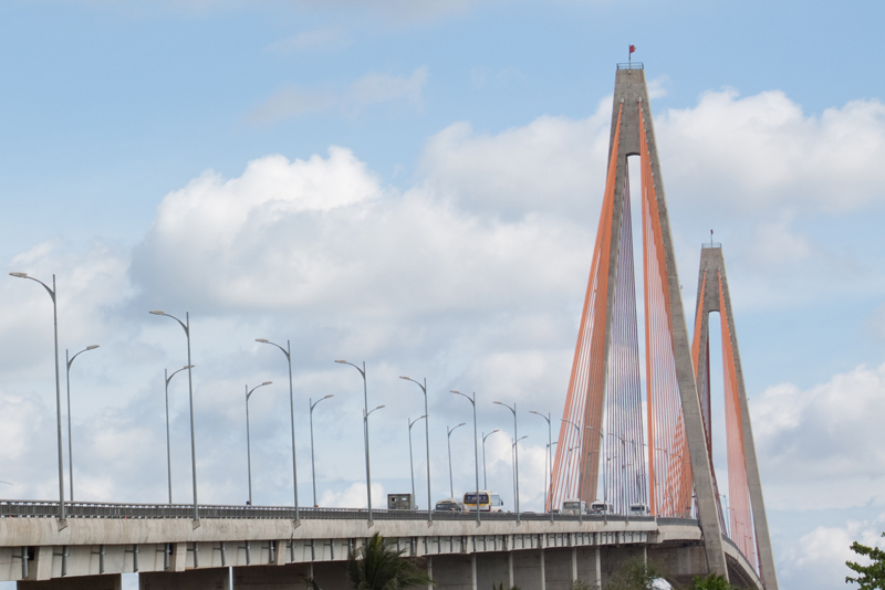 Nổi lo âu của bao thế hệ vì cách trở đò giang .Lúc 11h ngày 19/01/2009 cây cầu dây văng đầu tiên100% của Việt nam được khánh thành thông xe.Niềm mơ ước đã thành sự thật.